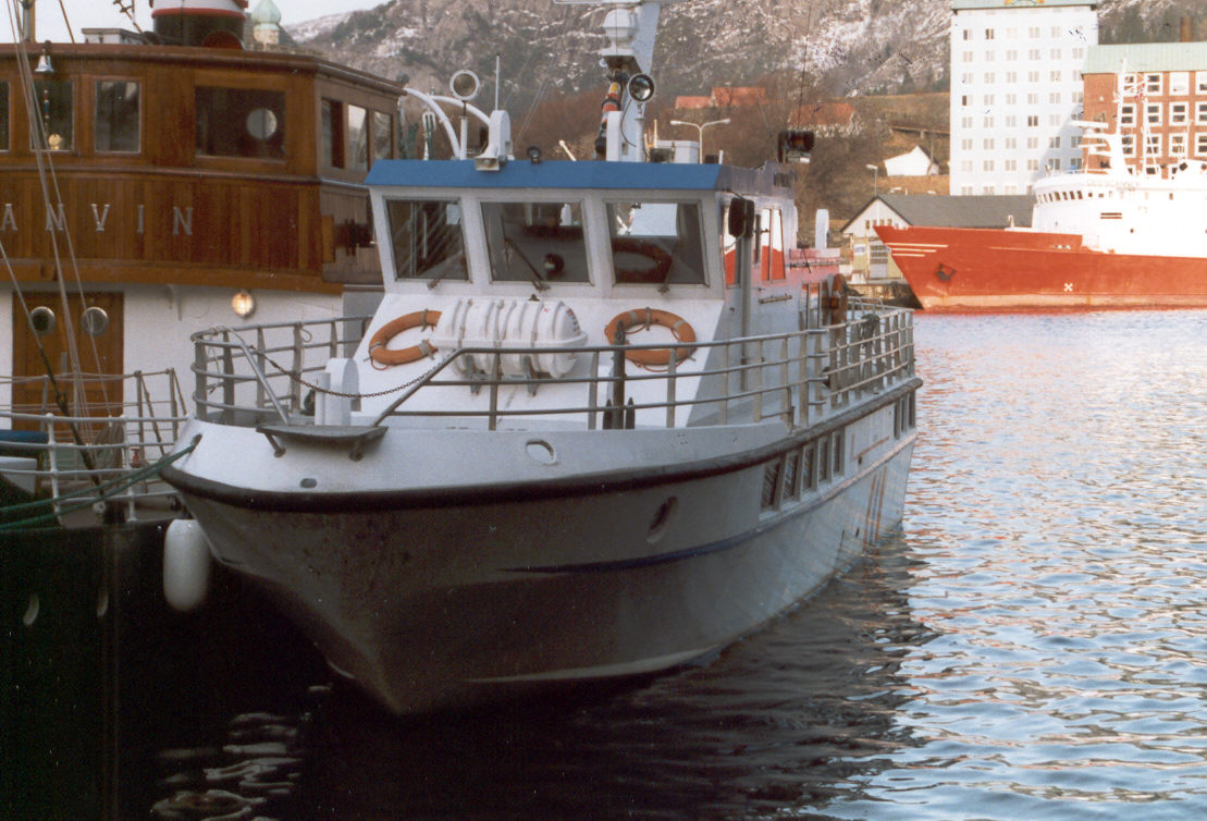 MS Gullving in Bergen, Norway in 1993.